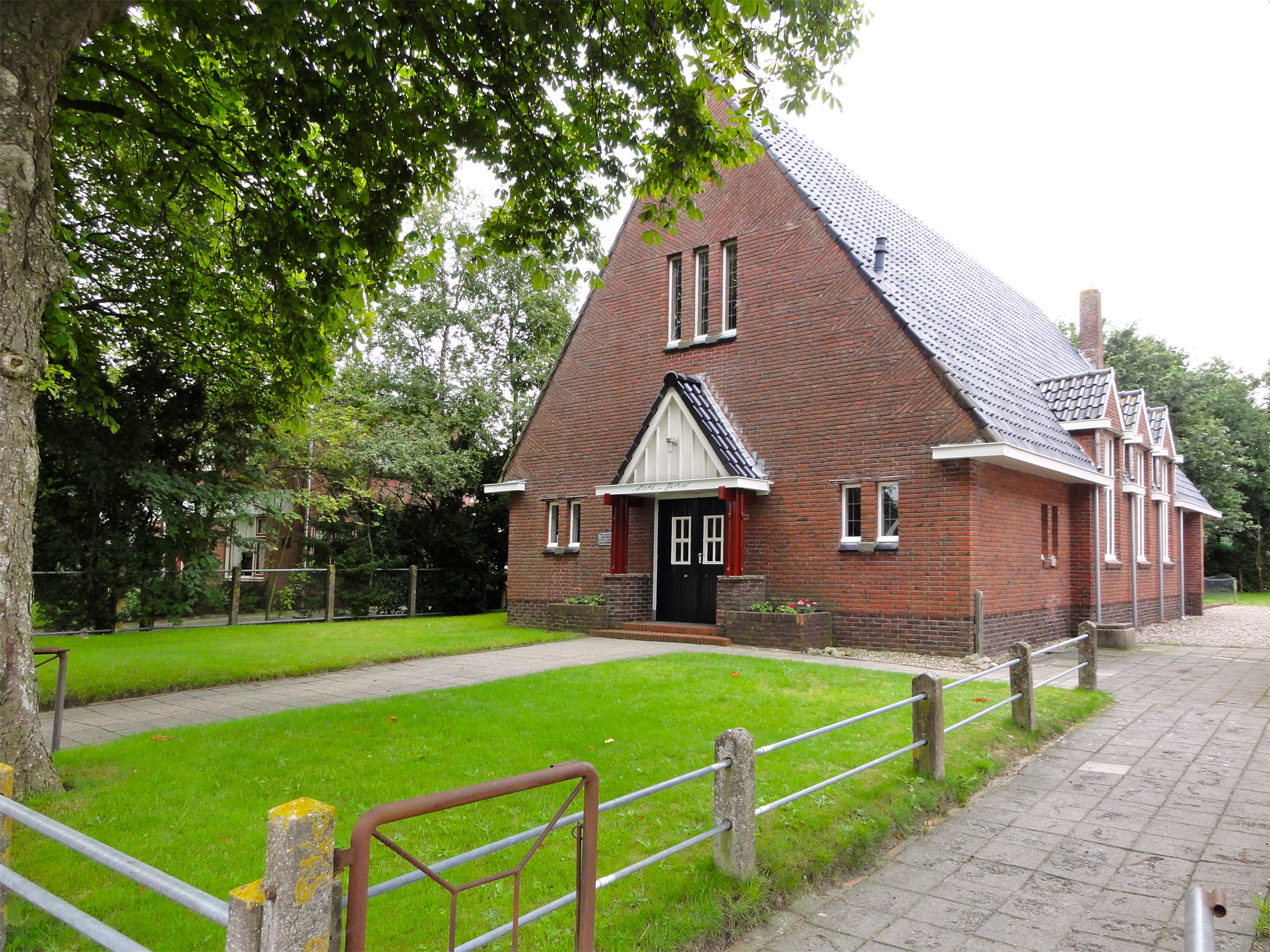 Kerkgebouw Noord Jeruël te Houtigehage